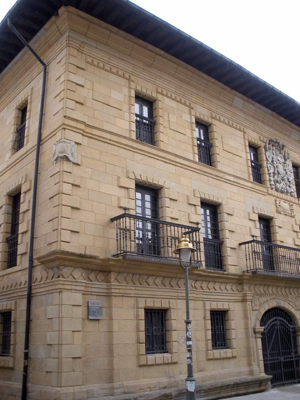 Saroe Jauregia (Usurbil, Gipuzkoa)